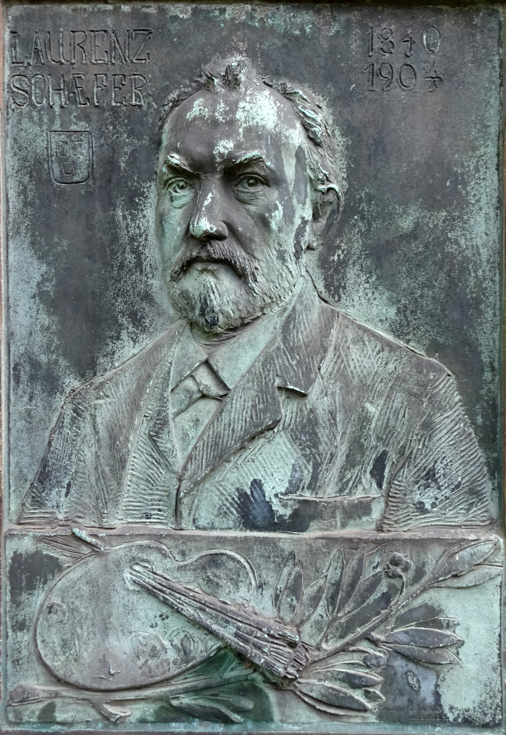 Maler Laurenz Schäfer (1840–1904), Bronzegießerei Förster und Kracht Düsseldorf